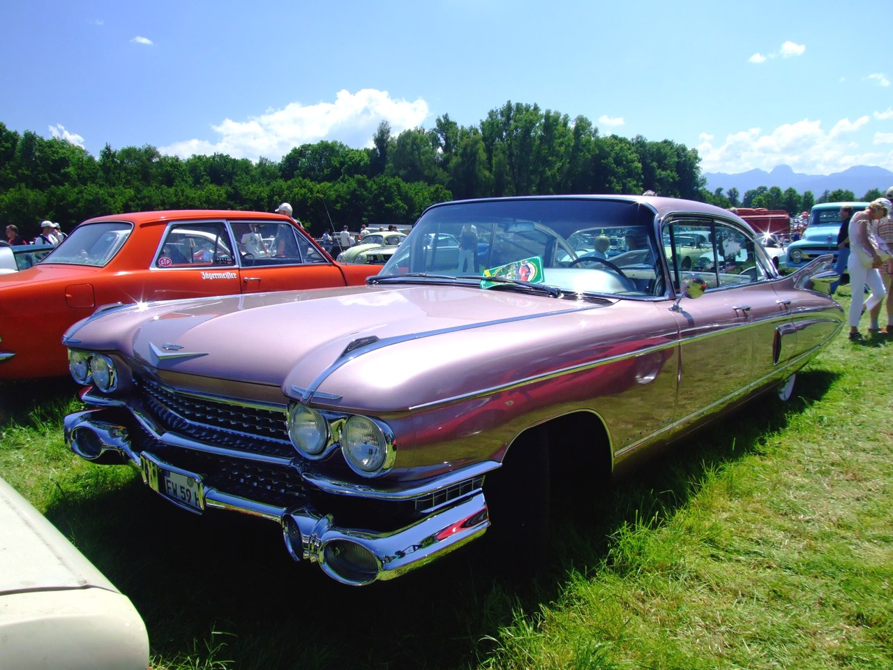 Quelle: selbst fotografiert, 06/2007 Fotograf: Späth Chr.